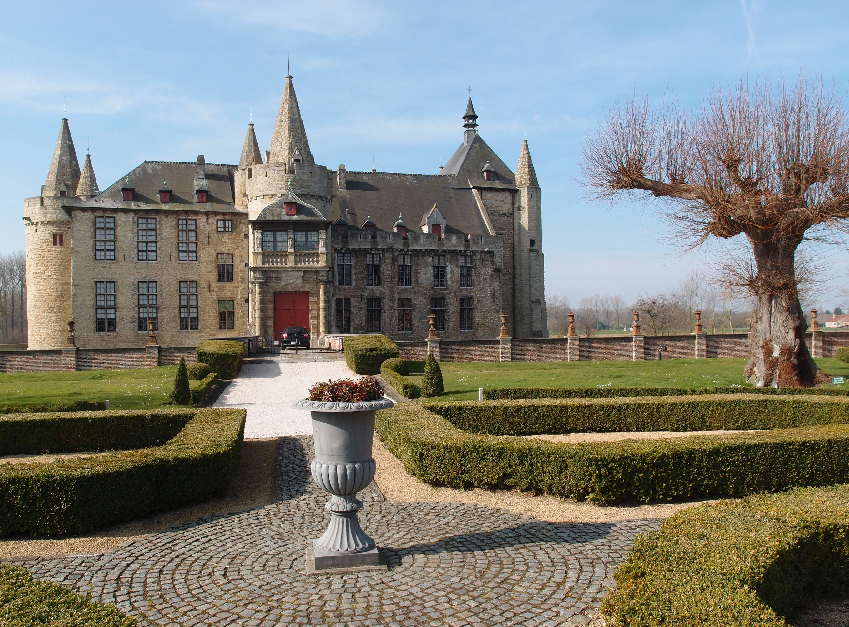 Schloss Laarne (Belgien) Datum: 08.03.2014 Urheber: M. Pfeiffer alias Gordito1869 Quelle: privates Fotoarchiv des Urhebers